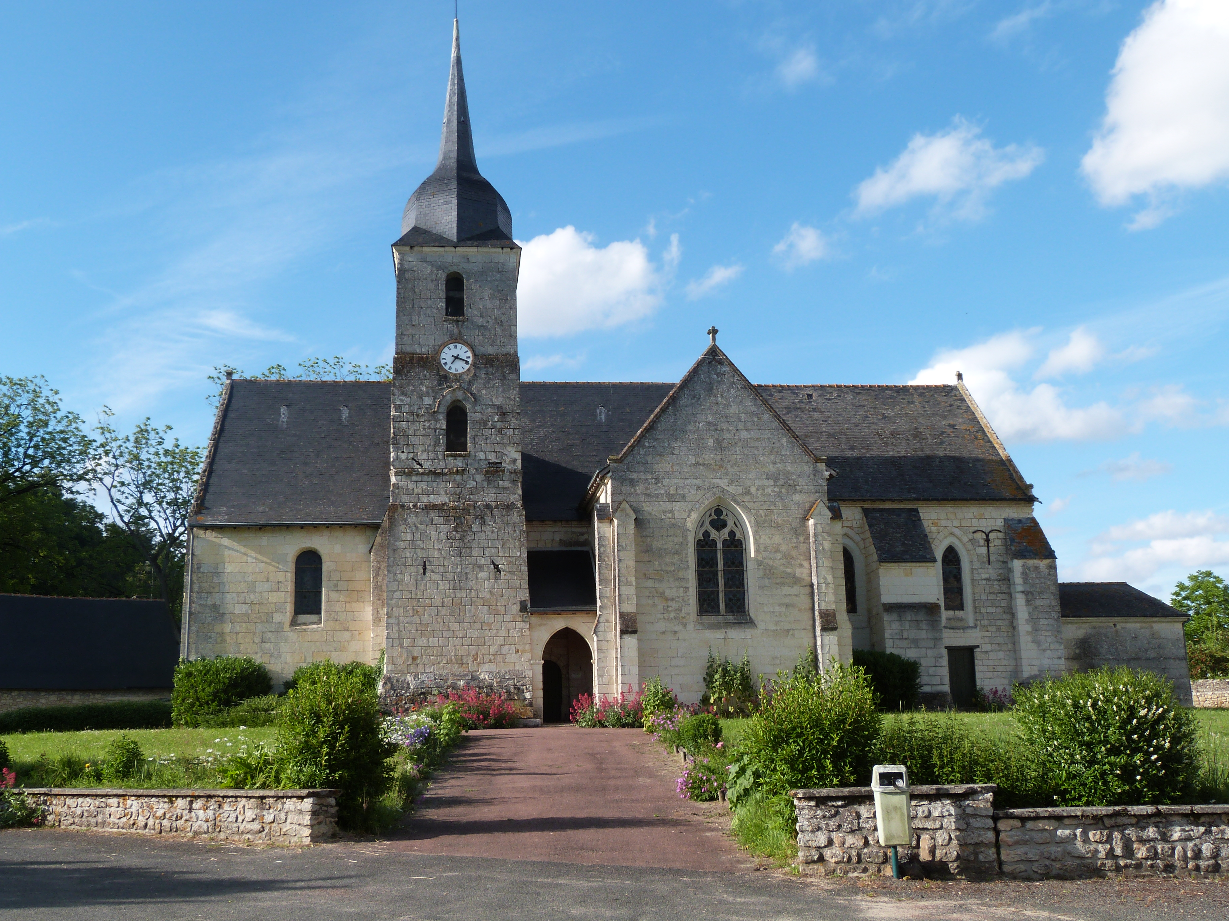 Église Saint-Maurice (Inscrit) .